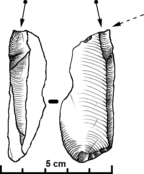 Buril diedro paleolítico - Tipo no real